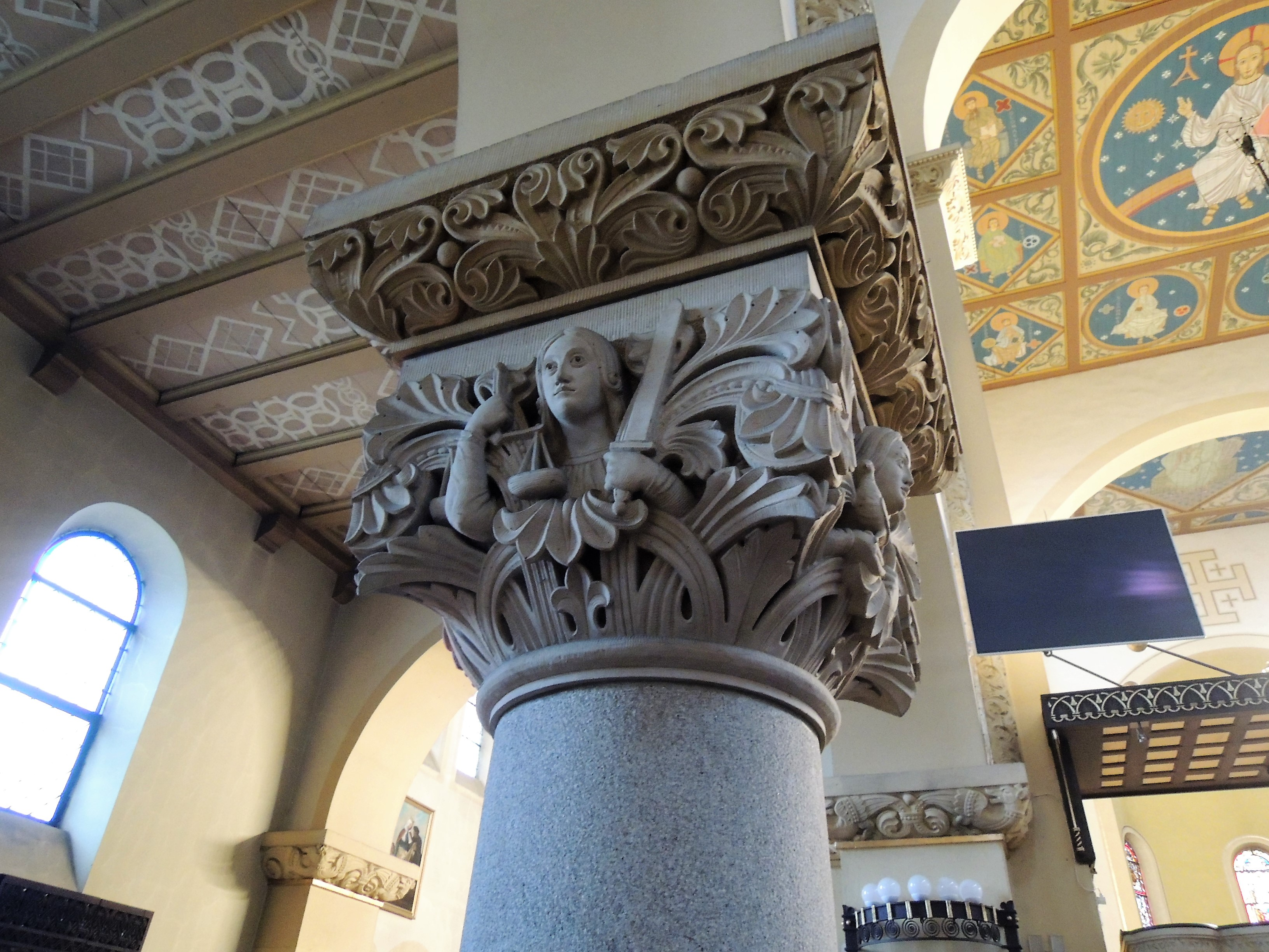 Kościół pw. św. Józefa w Rudzie Śląskiej, wybudowany z fundacji hrabiego Franciszka Ksawerego von Ballestrema w latach 1902-1904 według projektu Augusta Menkena z Berlina - głowica kolumny